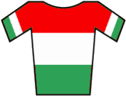 Maillot de Hungría